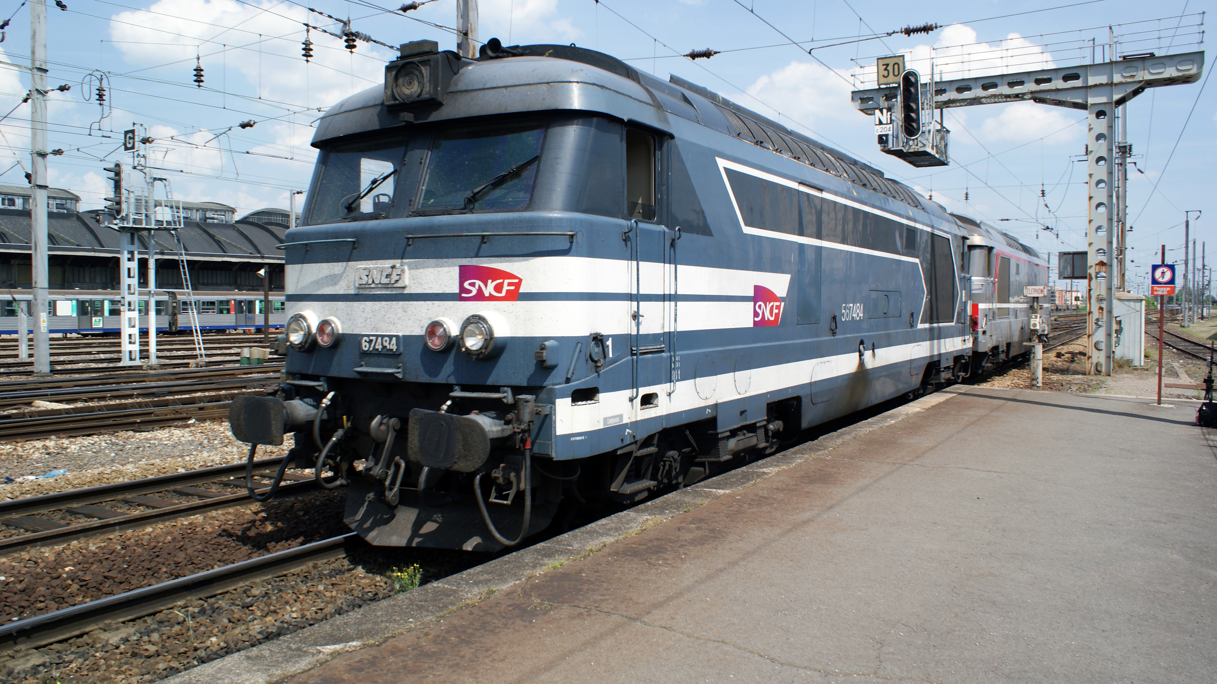 En préparation pour un Intercité vers Boulogne sur Mer